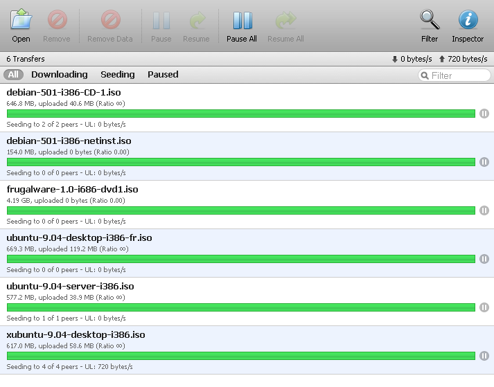 La capture d'écran illustre la fonctionnalité de gestion en ligne des torrents qui est offerte par le client Transmission.